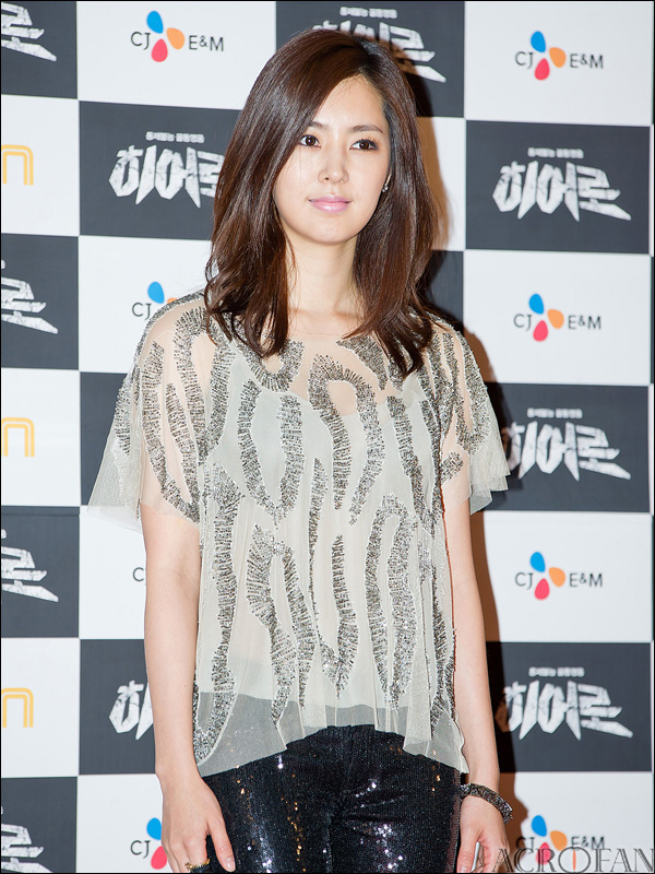 OCN 드라마 히어로 제작 발표회에 참석한 한채아